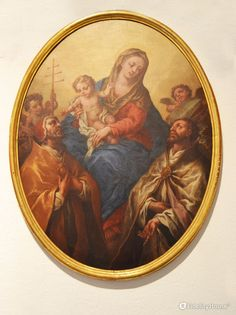 L'œuvre "Vierge à l'Enfant et les saints Célestin et Anselme" (1717) de Pietro Fabbri se trouve au musée diocésain de Mantoue.